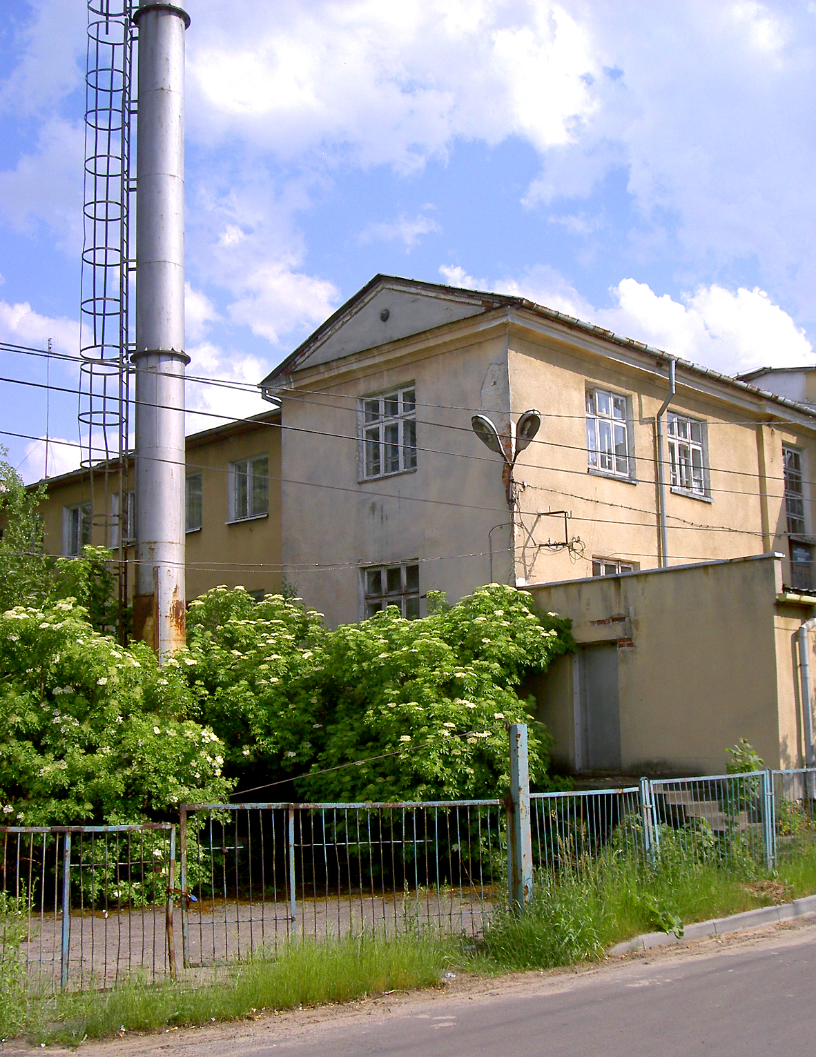 Tarnogród - Mleczarnia z 1938, Tarnogród, Poland - dairy from 1938